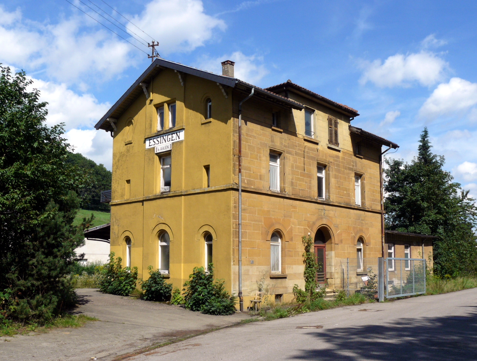 Bahnhofsgebäude in Essingen.